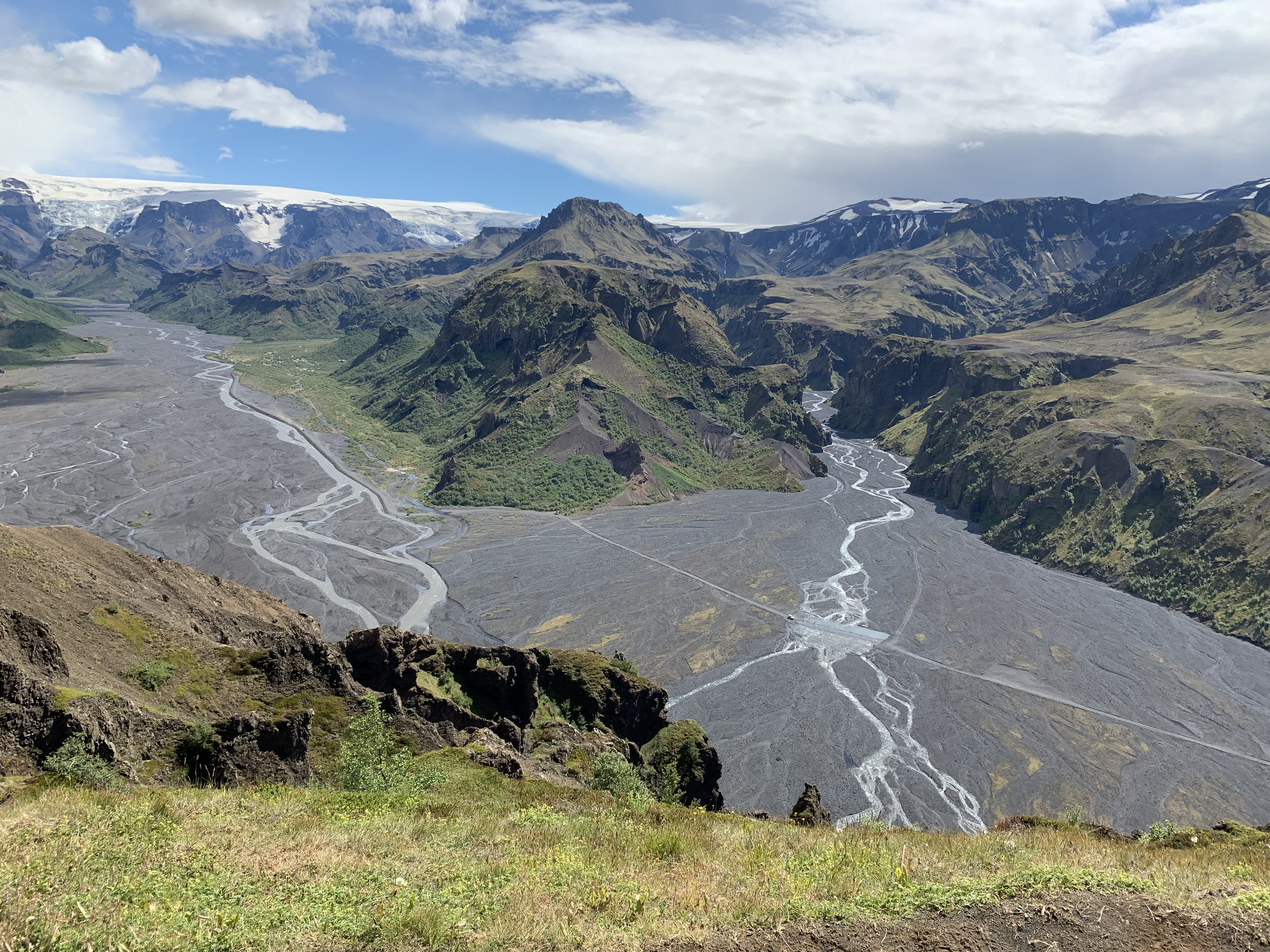 20190622_Valahnukur_1663